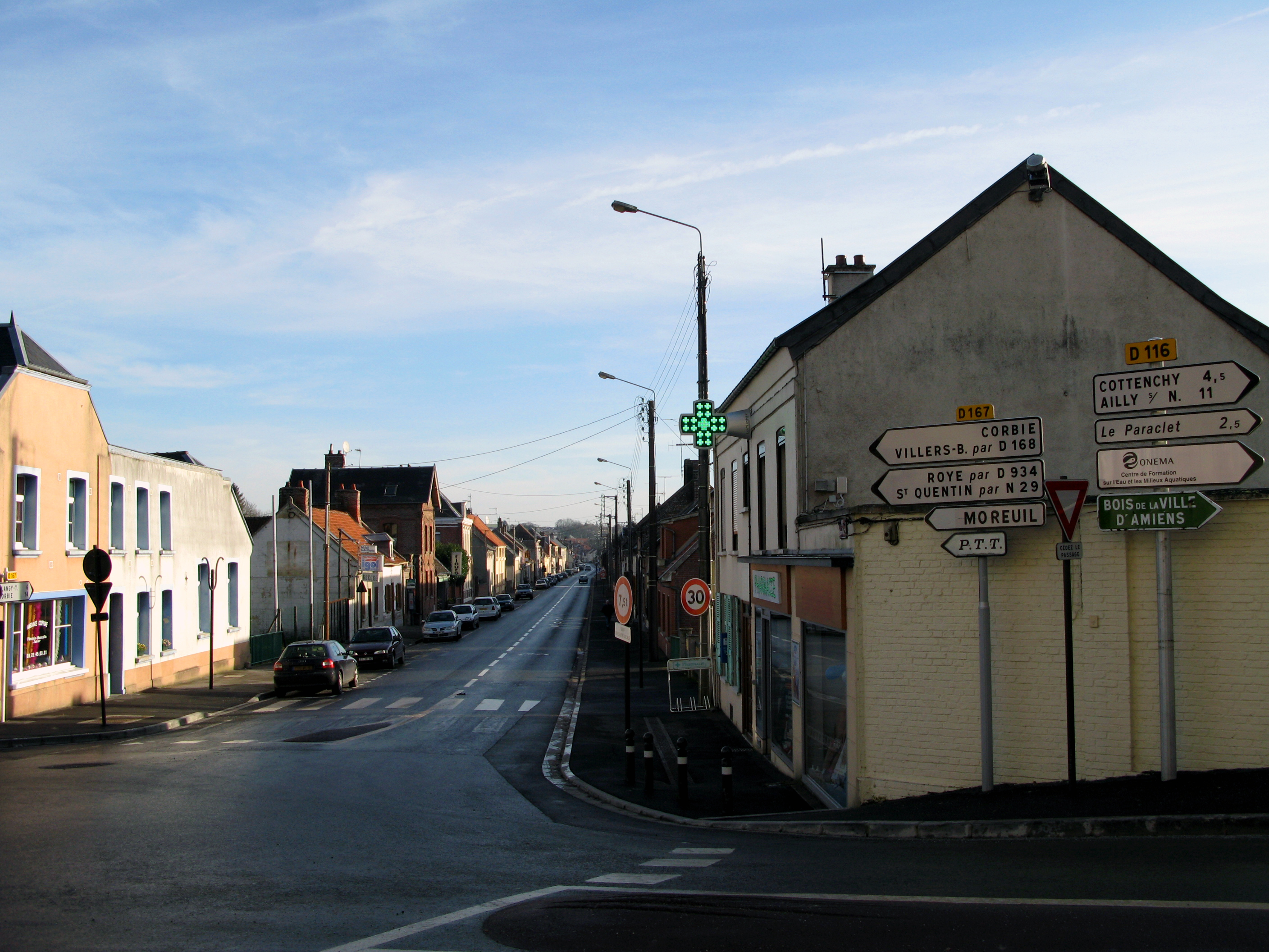 Boves (Somme, France) - La rue principale (rue Victor Hugo) vue depuis le côté de l'église, où elle croise à angle droit celle, venant d'Amiens, qui longe le pied de la falaise de craie). La Marie (invisible ici) se trouve environ à mi-distance de cette rue, sur la droite. Cette rue s'étire entre 2 rivières qu'elle franchit en fait. On devine le passage de la première par un "vide" à droite et à gauche entre les maisons du (presque) premier plan (à droite peu après la façade de la pharmacie, et à gauche au niveau de la deuxième voiture).